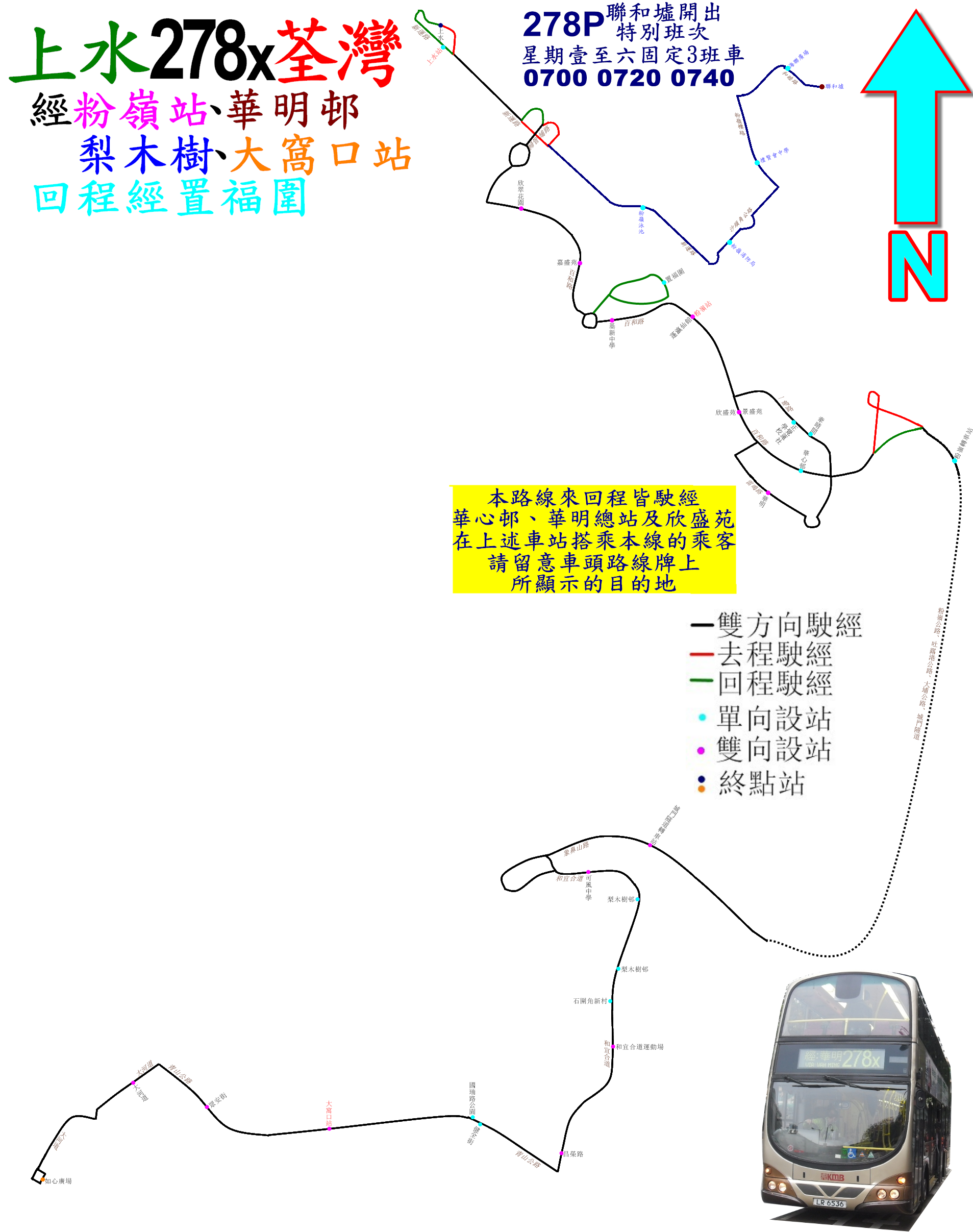 中文（香港）: 九巴278X線的走線圖